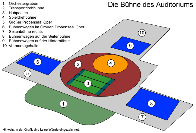 Die Bühne des Auditoriums des Musiktheaters Linz